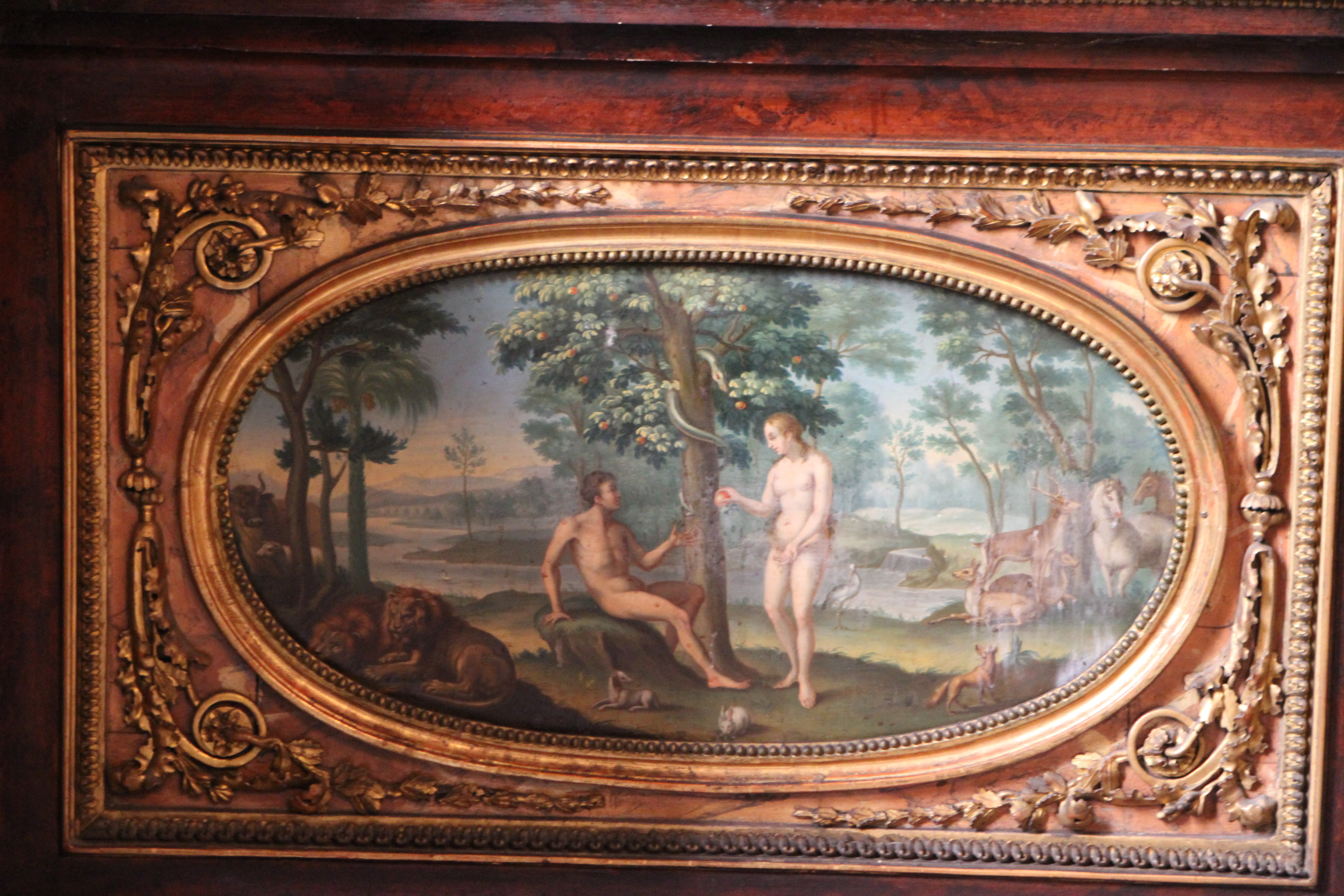 Griech.-orient. (orth.,nichtun.) Kirche Hl. Dreifaltigkeit m.Pfarr- u.Schulhaus